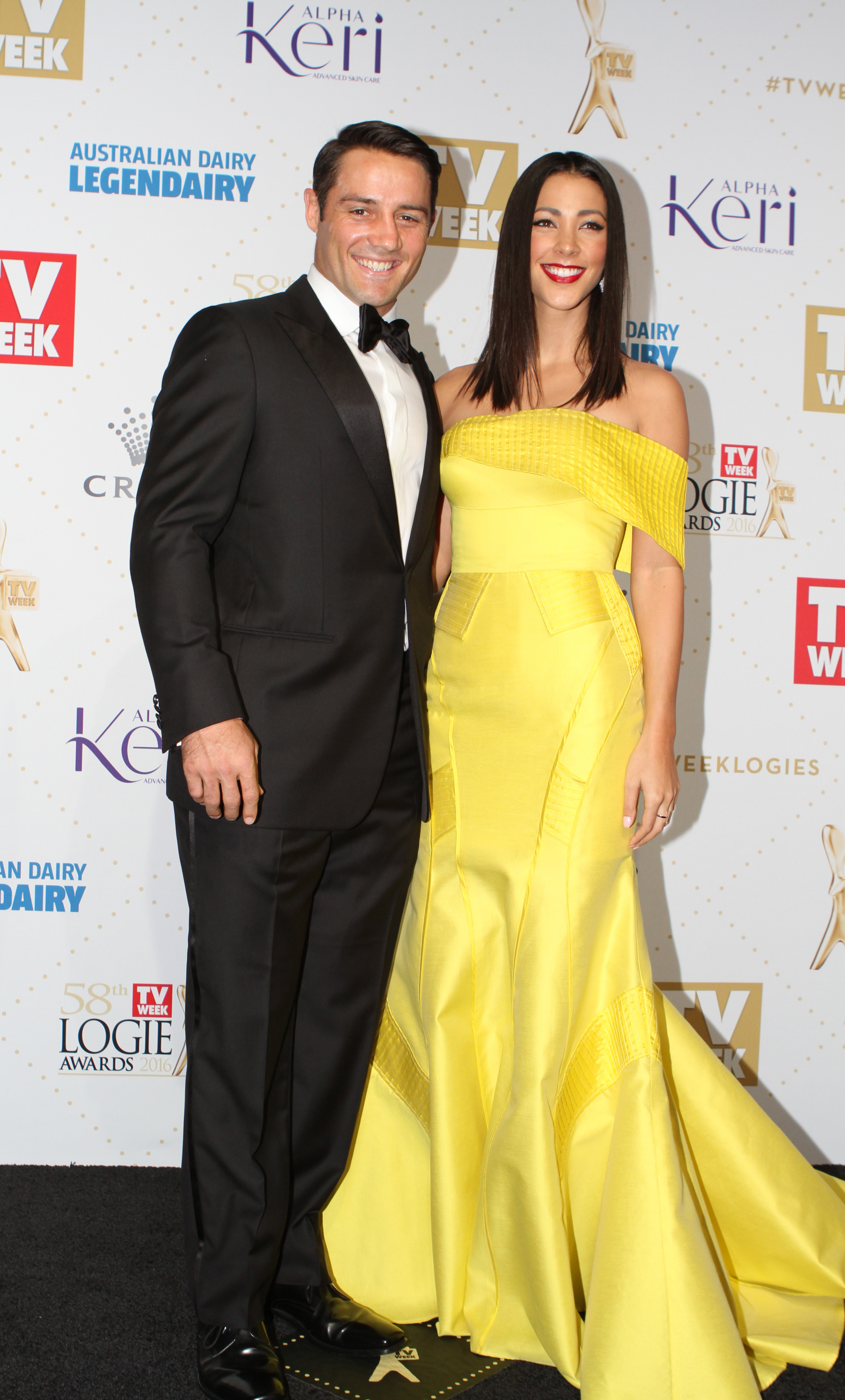 Cooper Cronk. Tara Rushton 2016 TV Week Logie Awards